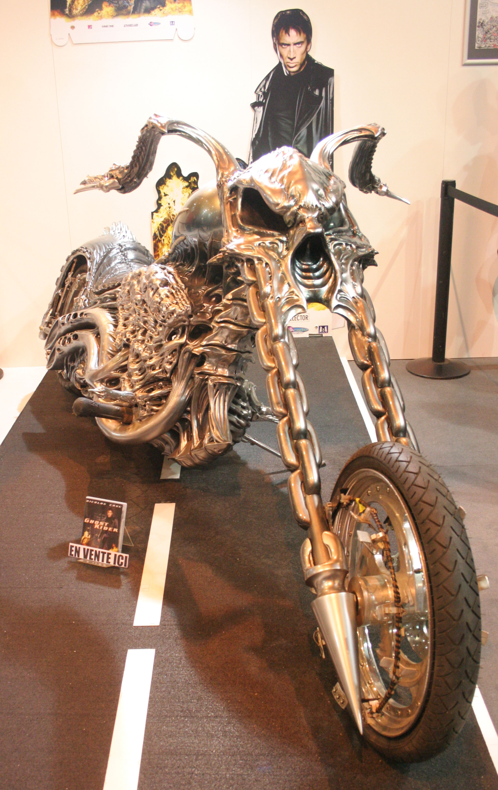 Ghost rider's bike